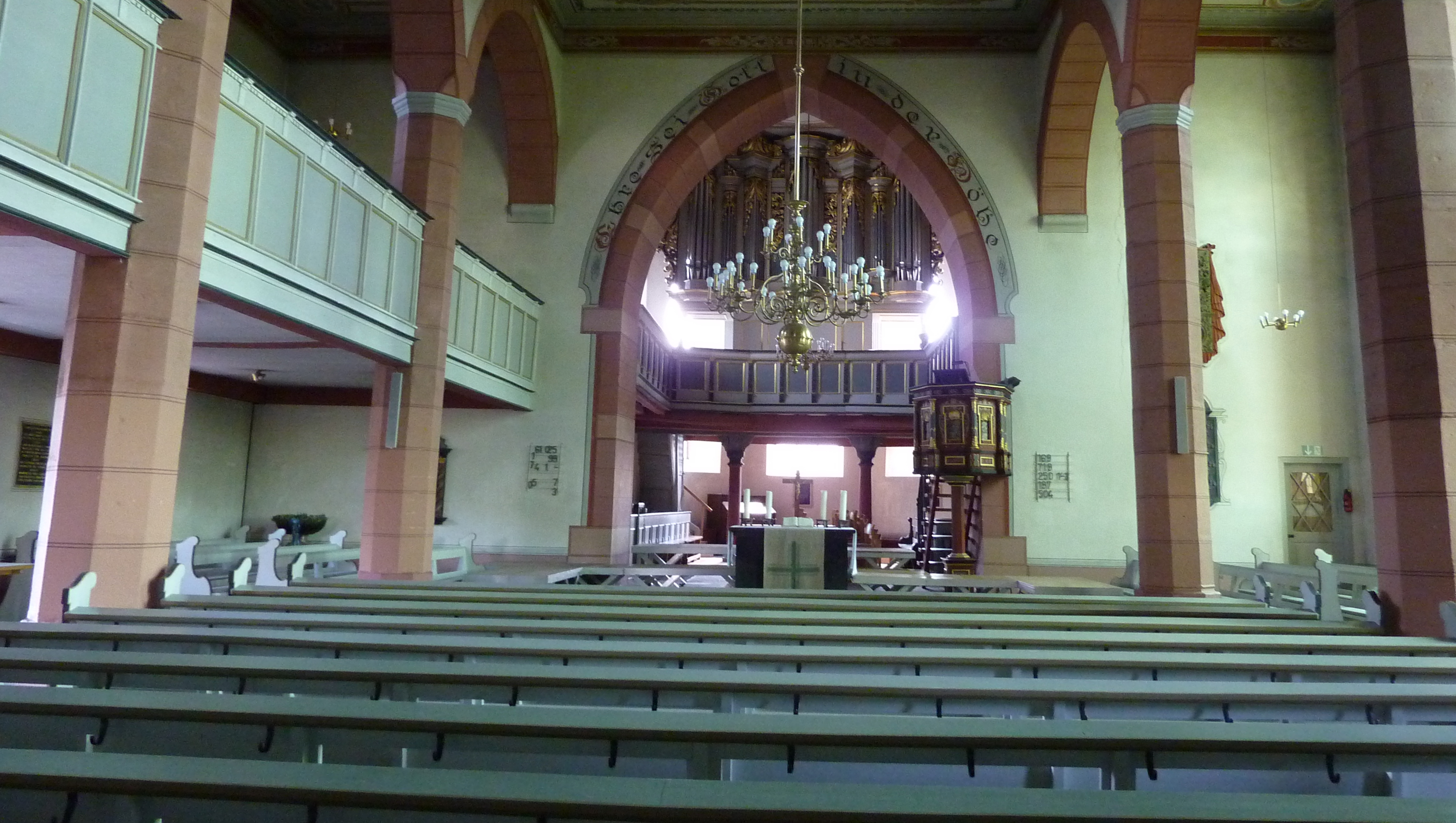 Evangelische Pfarrkirche in Usingen im Hochtaunuskreis (Hessen), Kirchgasse